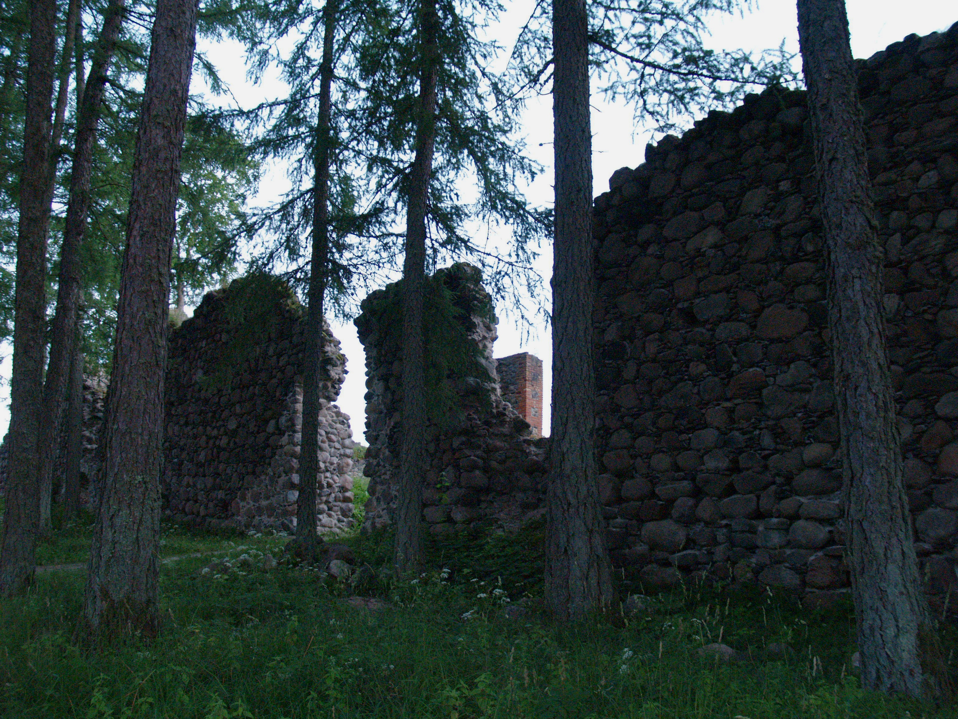 Härgmäe ordulinnus. Idakülg.